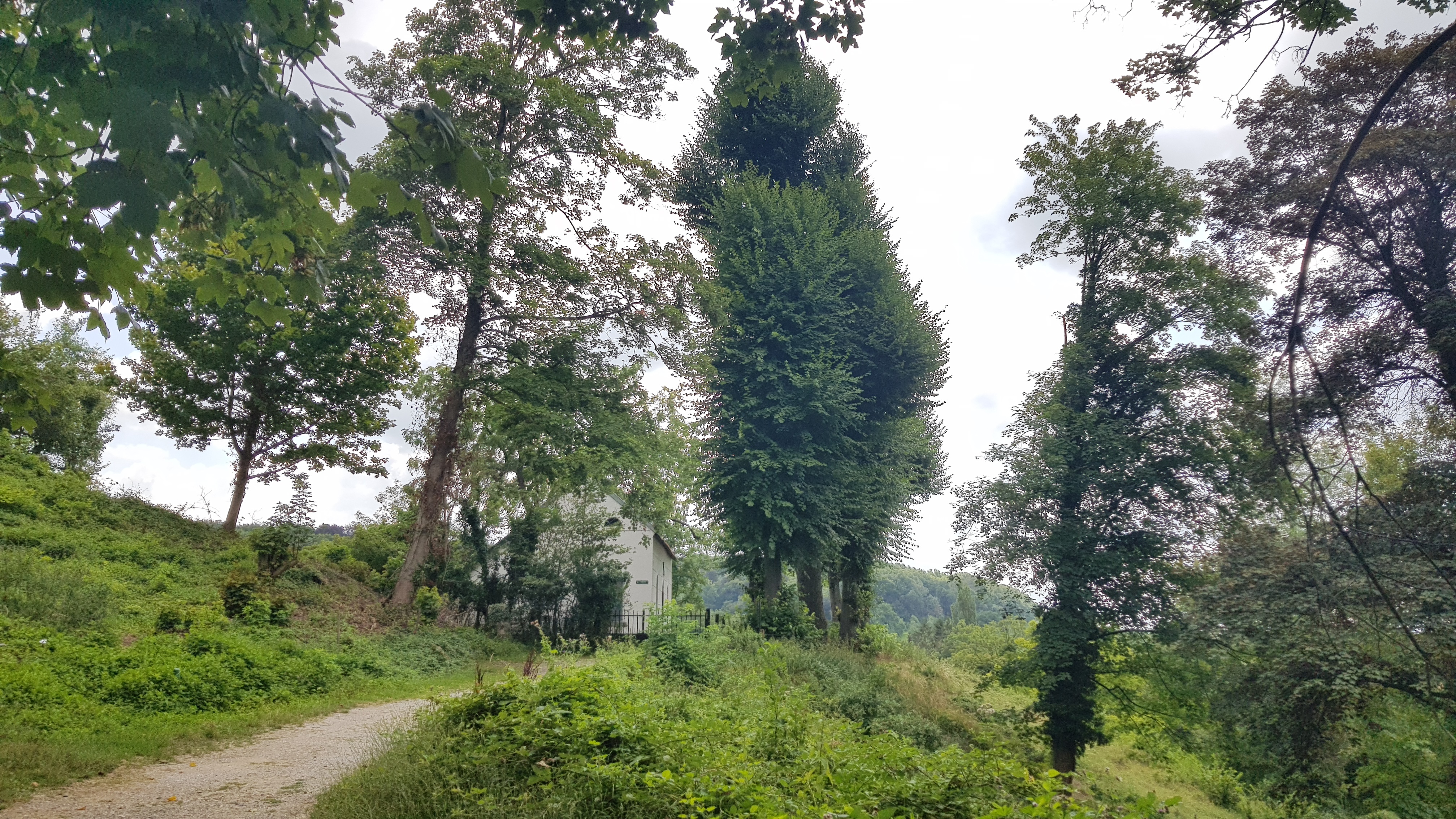 Huis De Beuk in het Savelsbos, Gronsveld, Nederland